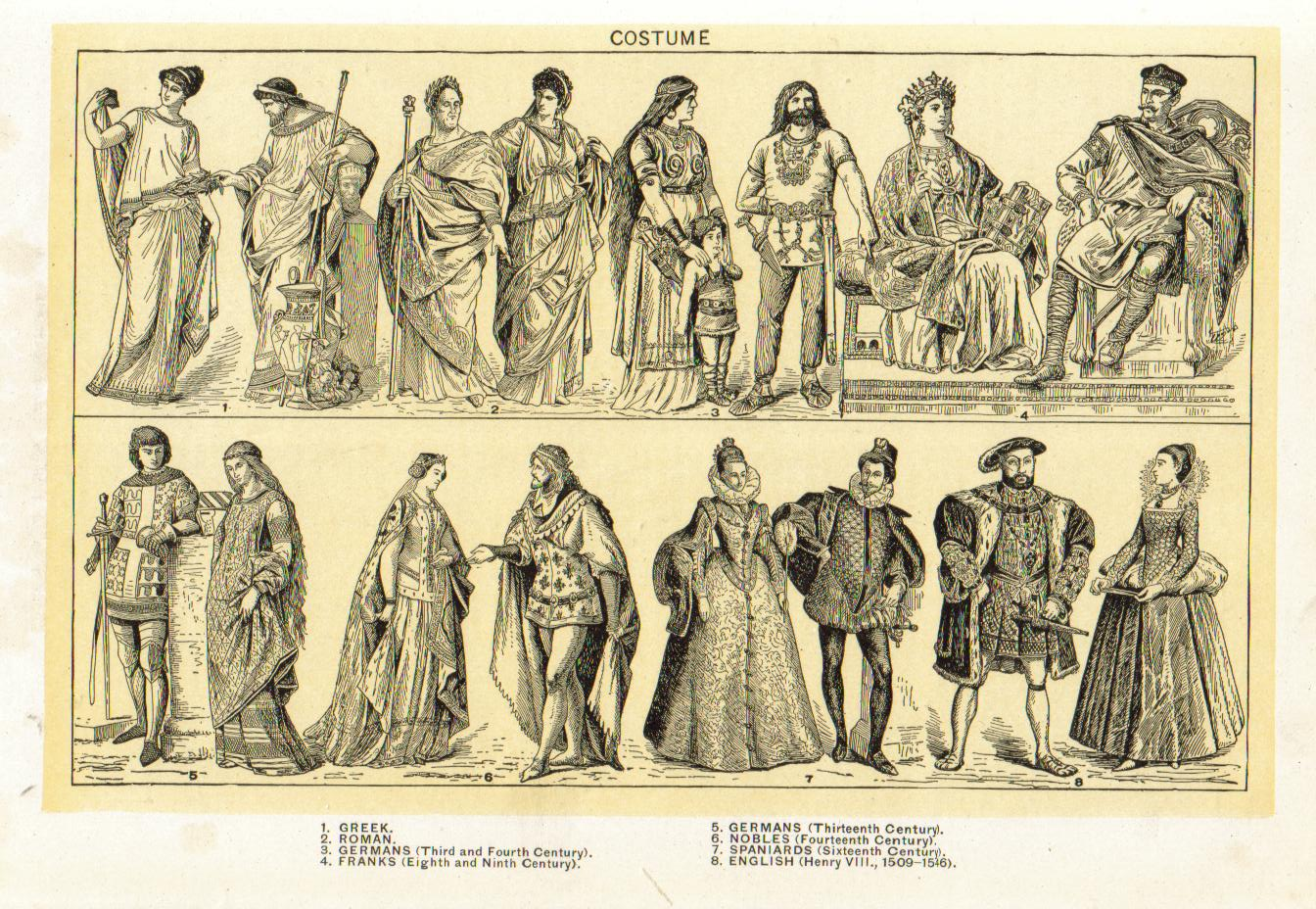 Drawing